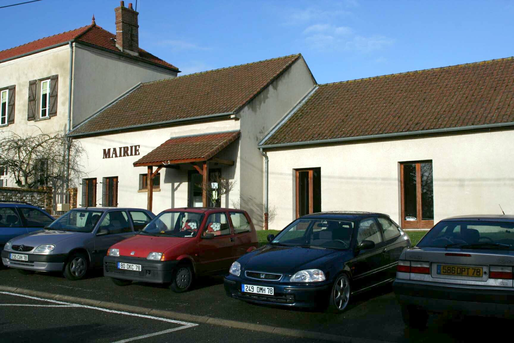 Mairie de Fontenay-Mauvoisin - Yvelines (France).